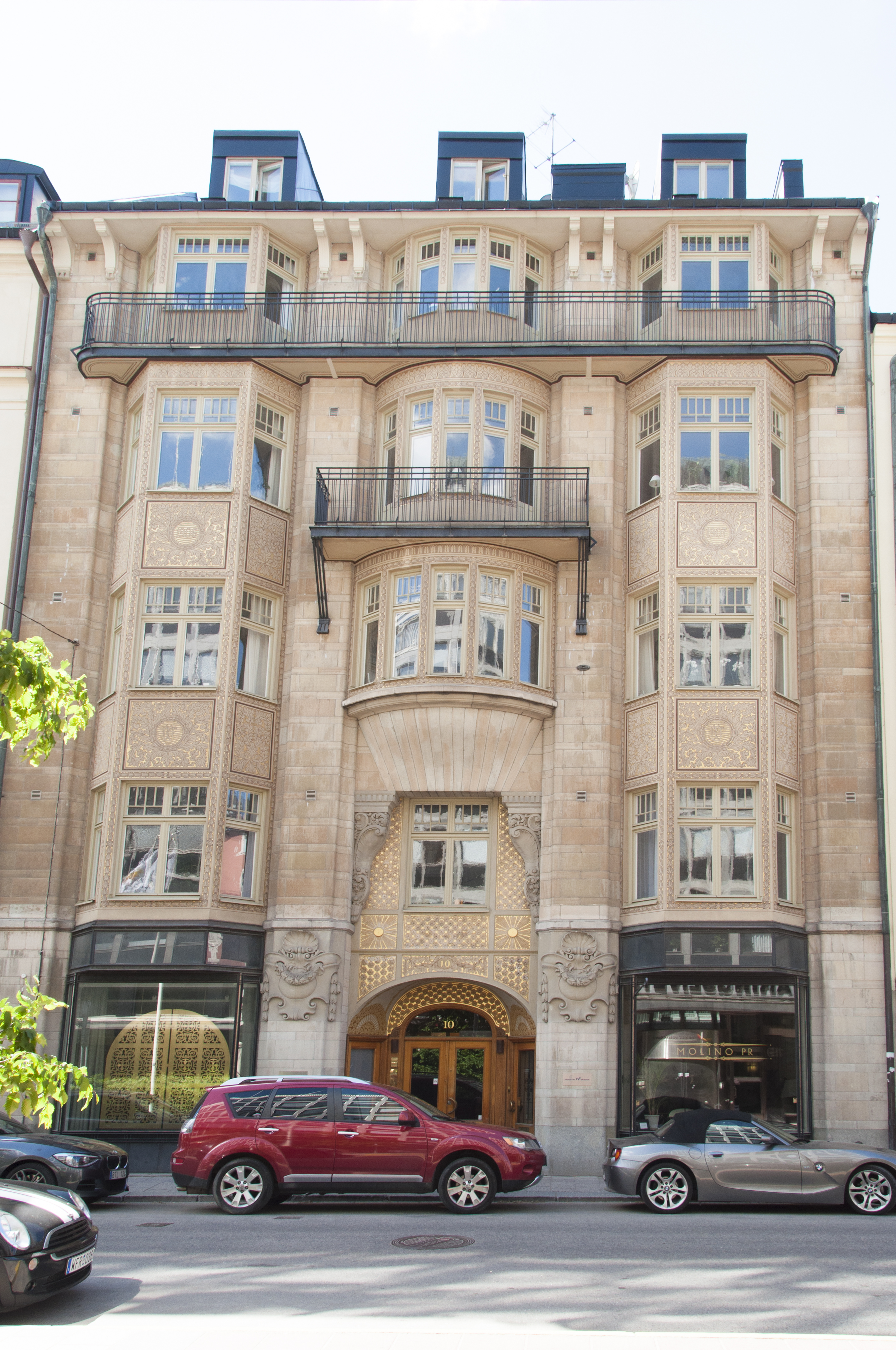 Havssvalget 17, Storgatan 10 Byggnadsår 1905-06, arkitekt Hagström & Ekman, byggherre K Eklunds' sterbhus, byggmästare K Flodin & Järnbetong.